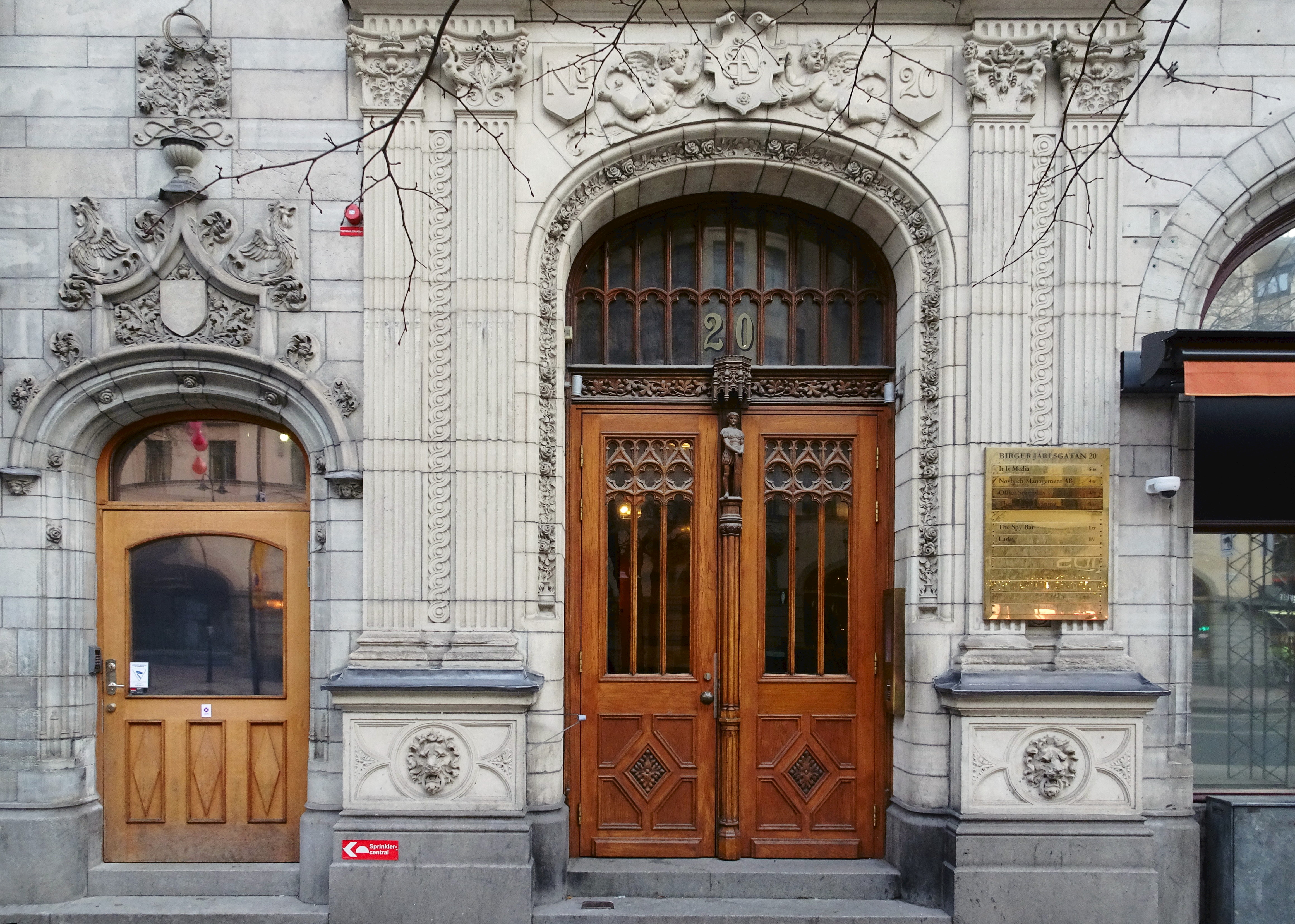 Daneliuska huset, Birger Jarlsgatan 20, portal